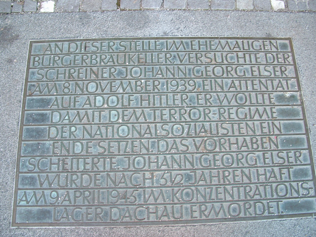 Begehbare Gedenktafel an der Stelle des ehemaligen Bürgerbräukellers in München. Bild: von Iki